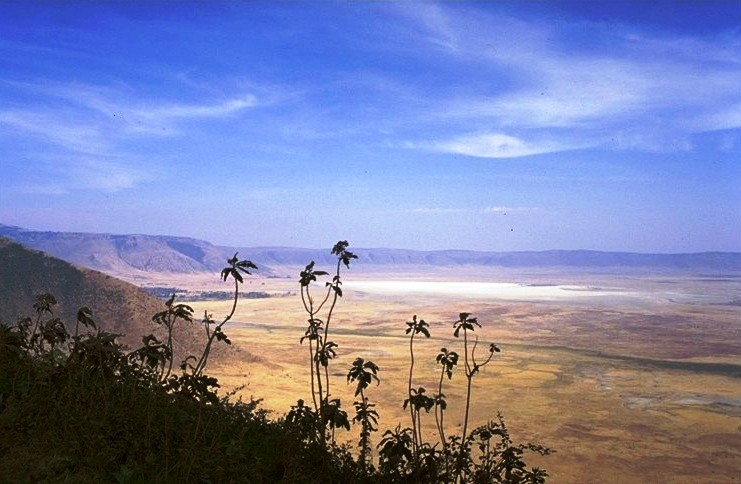 Ngorongoro crater - Tanzania